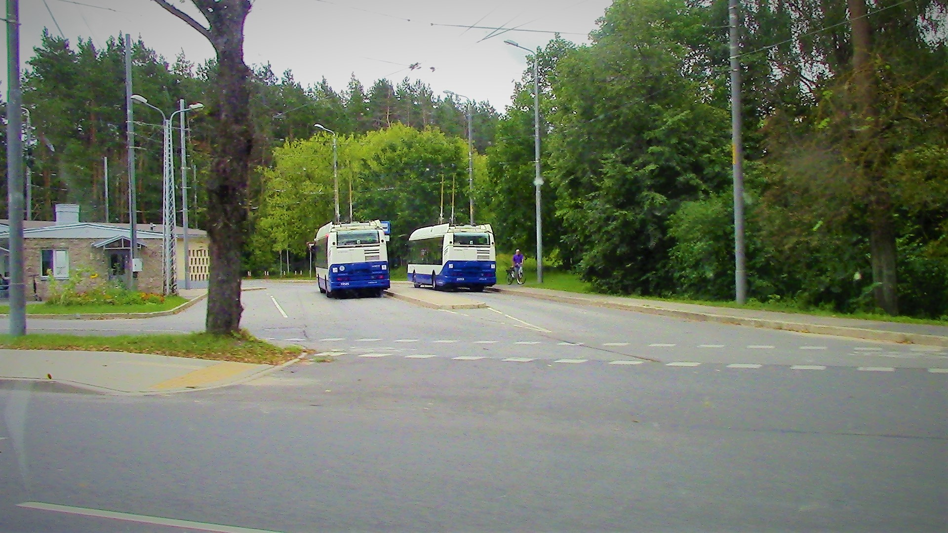 Trolejbusu galapunkts "Šmerlis" (19.08.2019.)